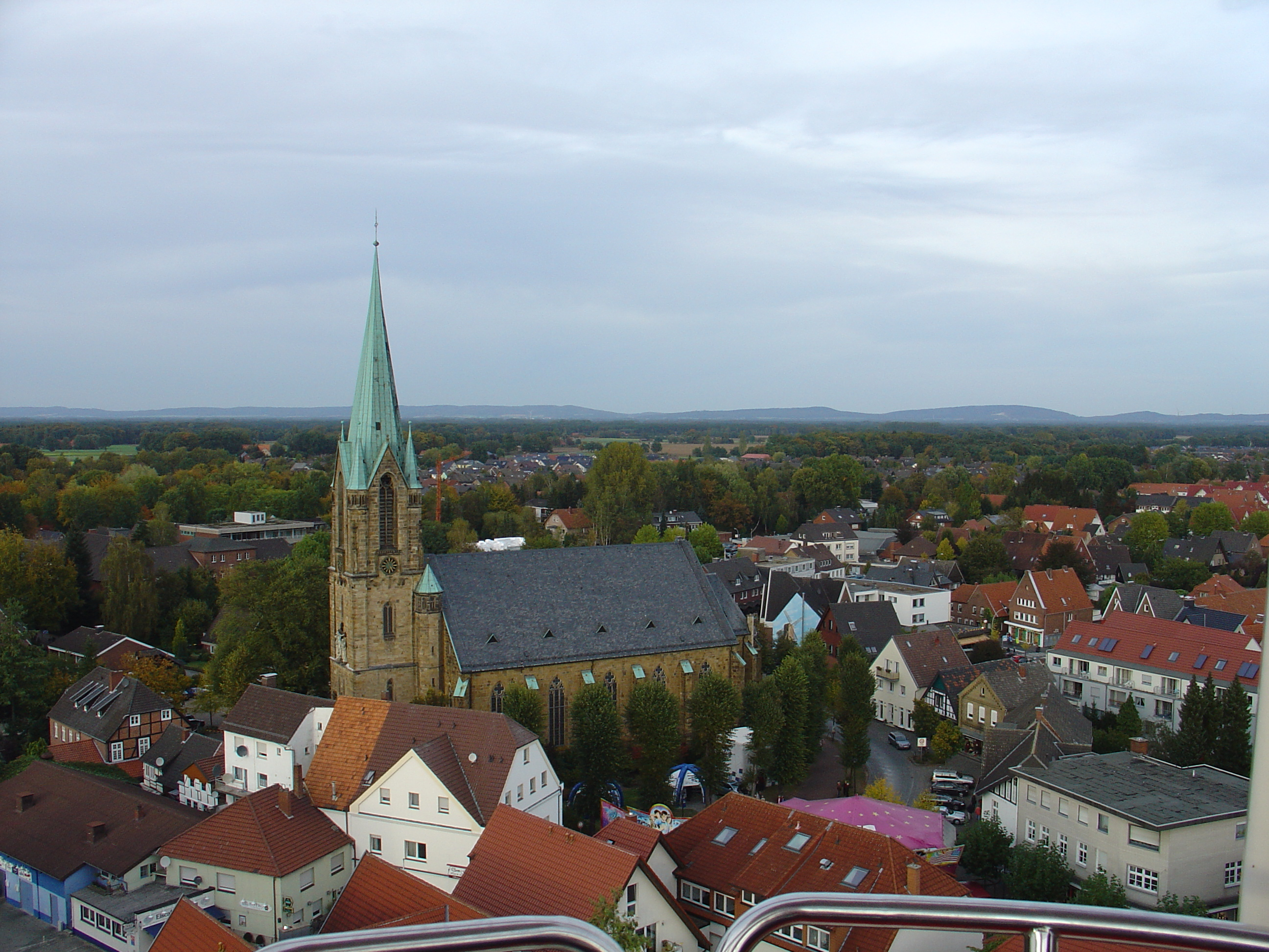 kath. Pfarrkirche St. Lucia